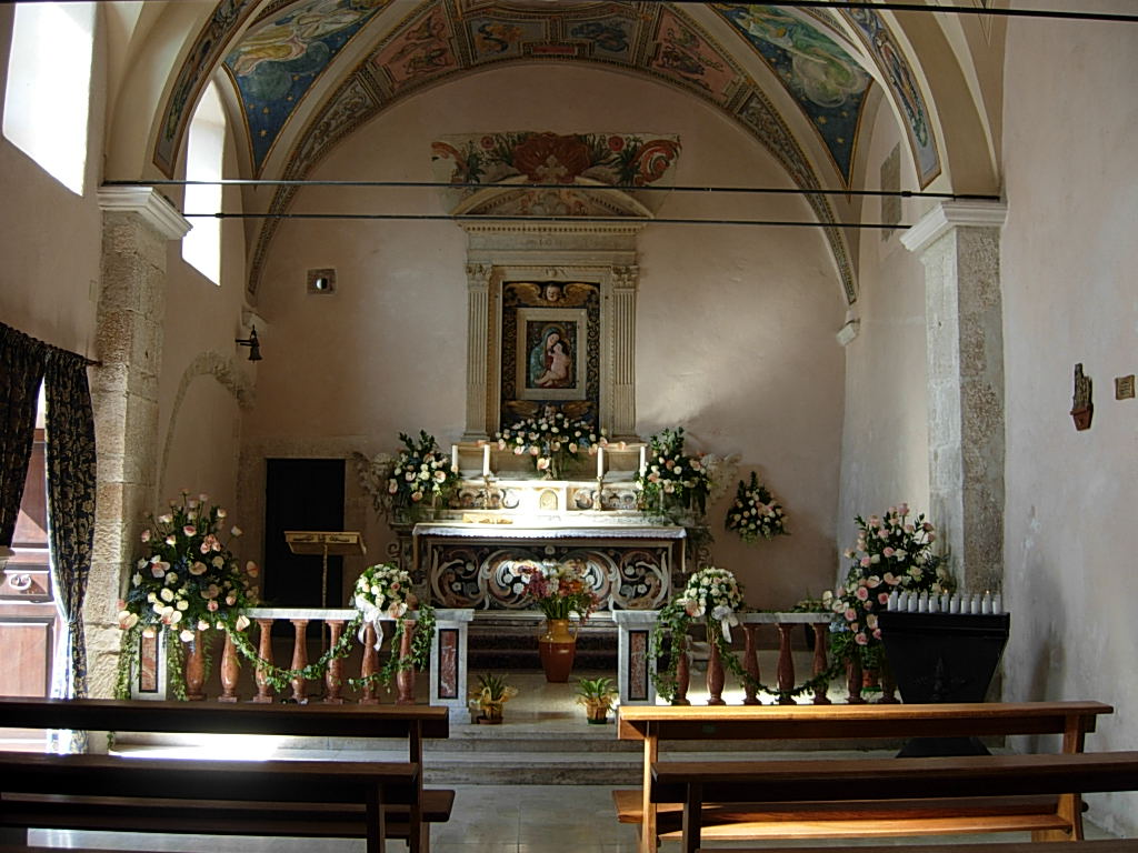 Santuario della Madonna della Portella in Rivisondoli (AQ) Foto personale concessa in PD